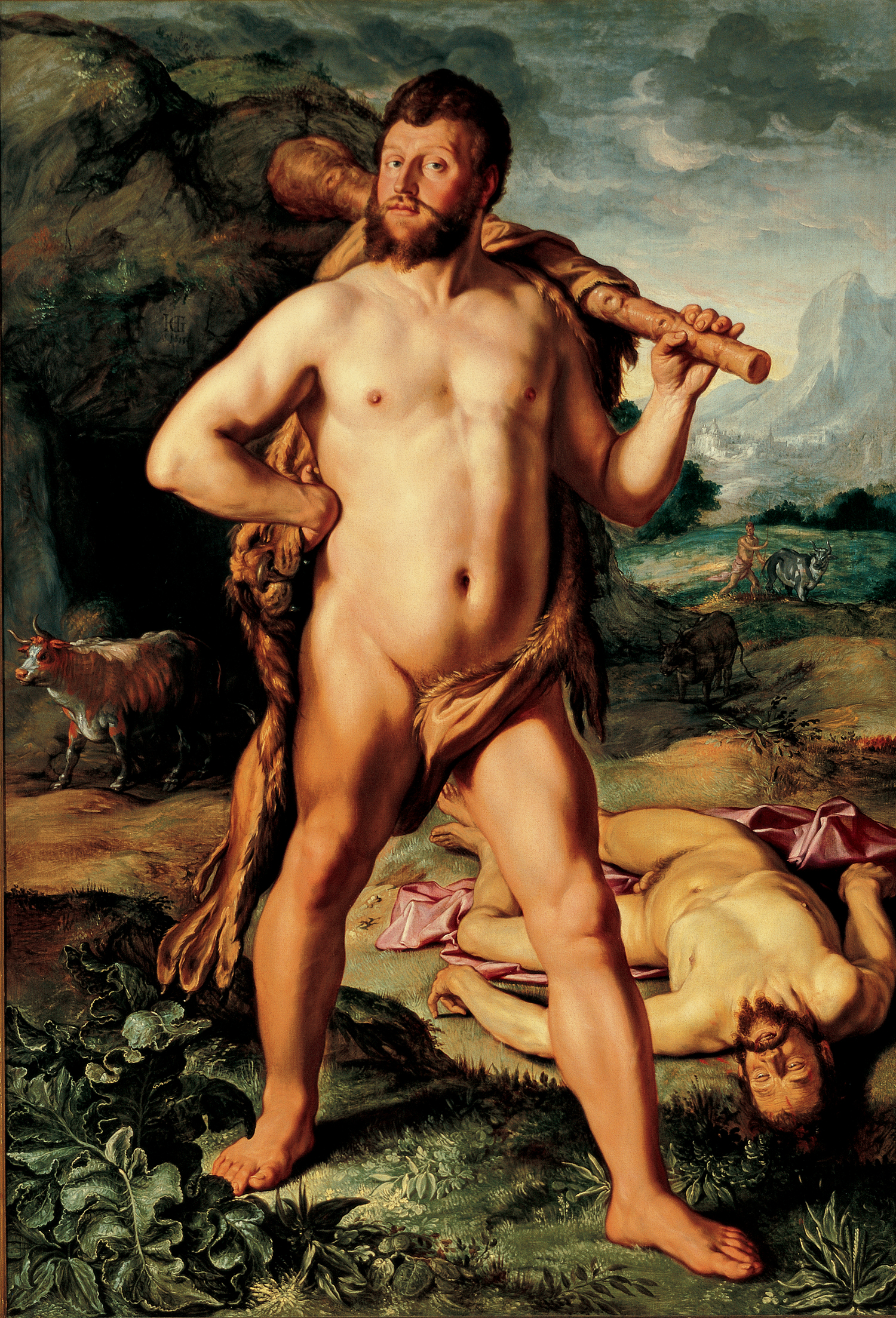 Hendrick Goltzius – Hercules en Cacus Goltzius, Hendrick Mühlbracht 1558 - Haarlem 1617 Hercules en Cacus 1613 doek: 207 x 142,5 cm